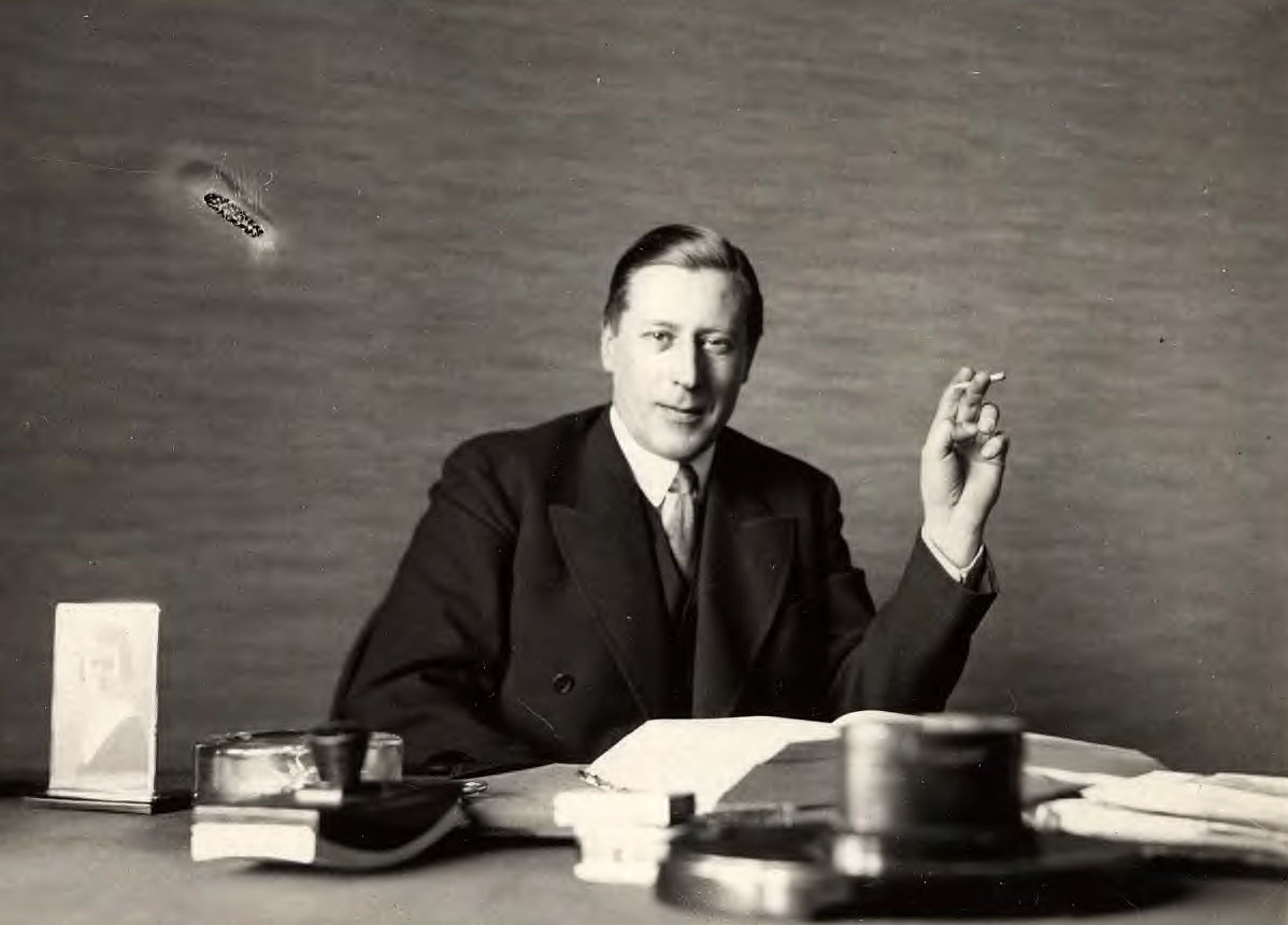 Leon Malhomme